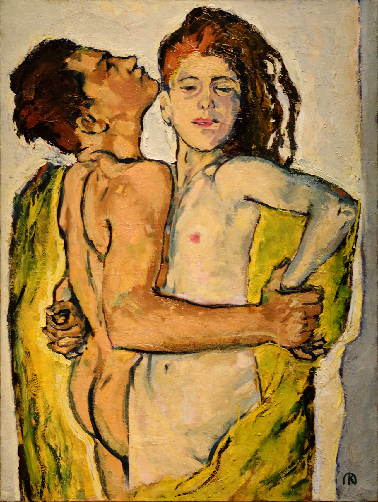 Les amoureux. Koloman Moser, c 1913. Leopold Museum, Vienne